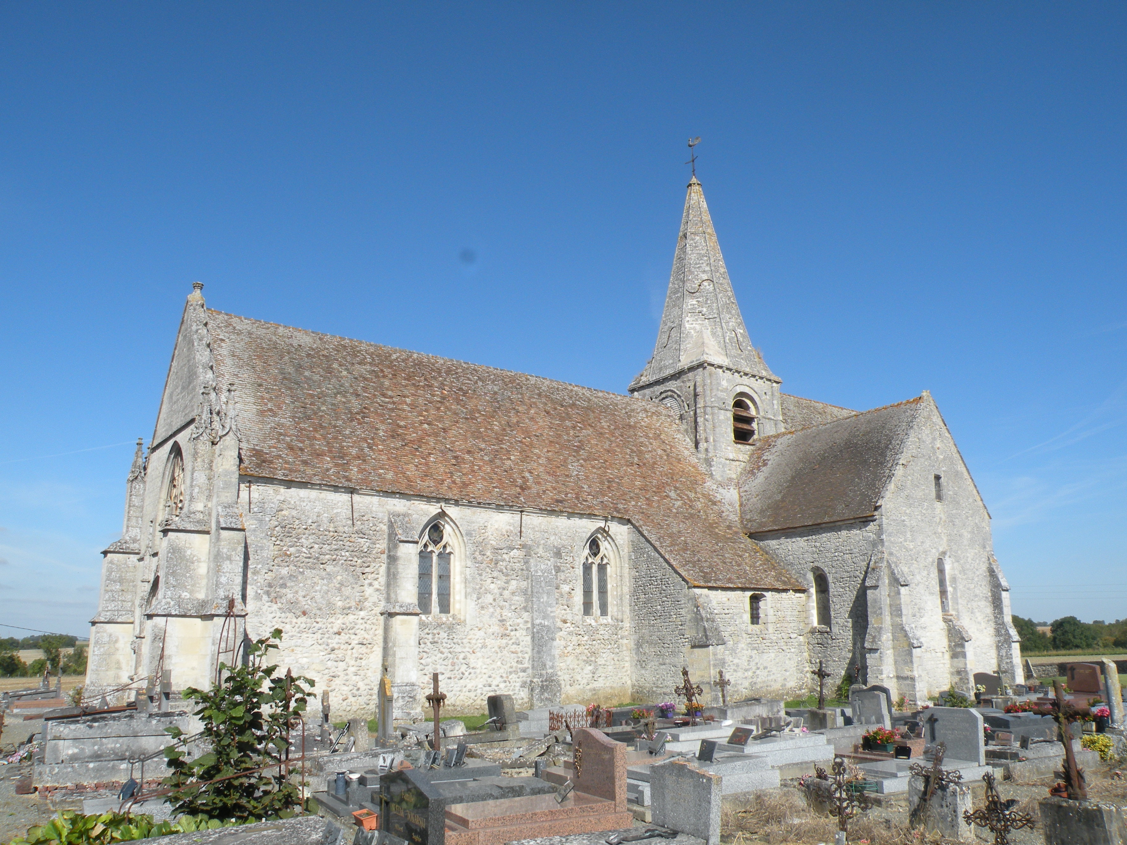 Église Saint-Gilles-Saint-Leu de Boubiers